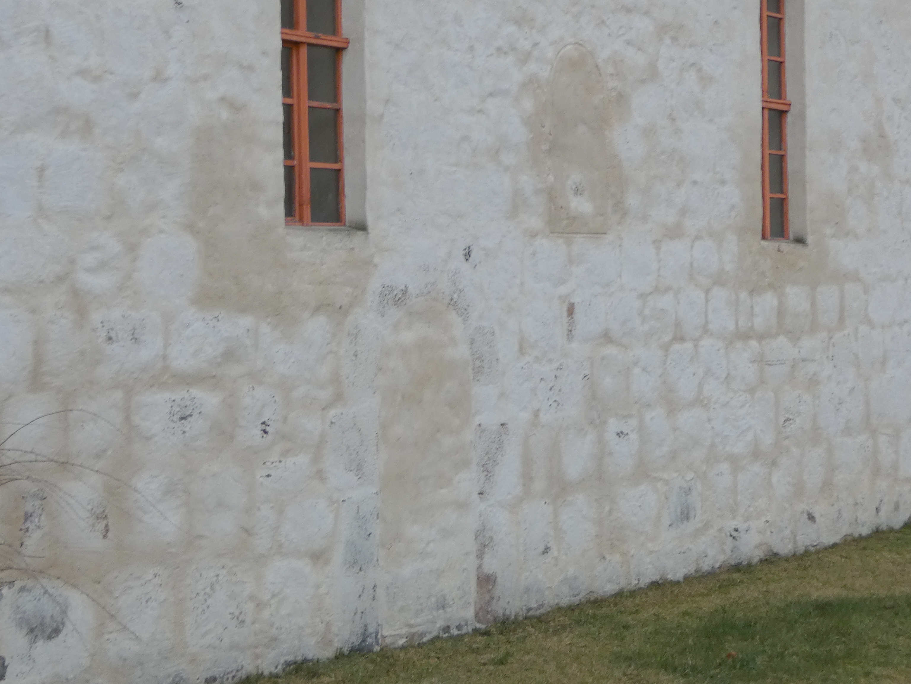 Dorfkirche Mahlenzien, Südwand mit erkennbaren romanischen Elementen